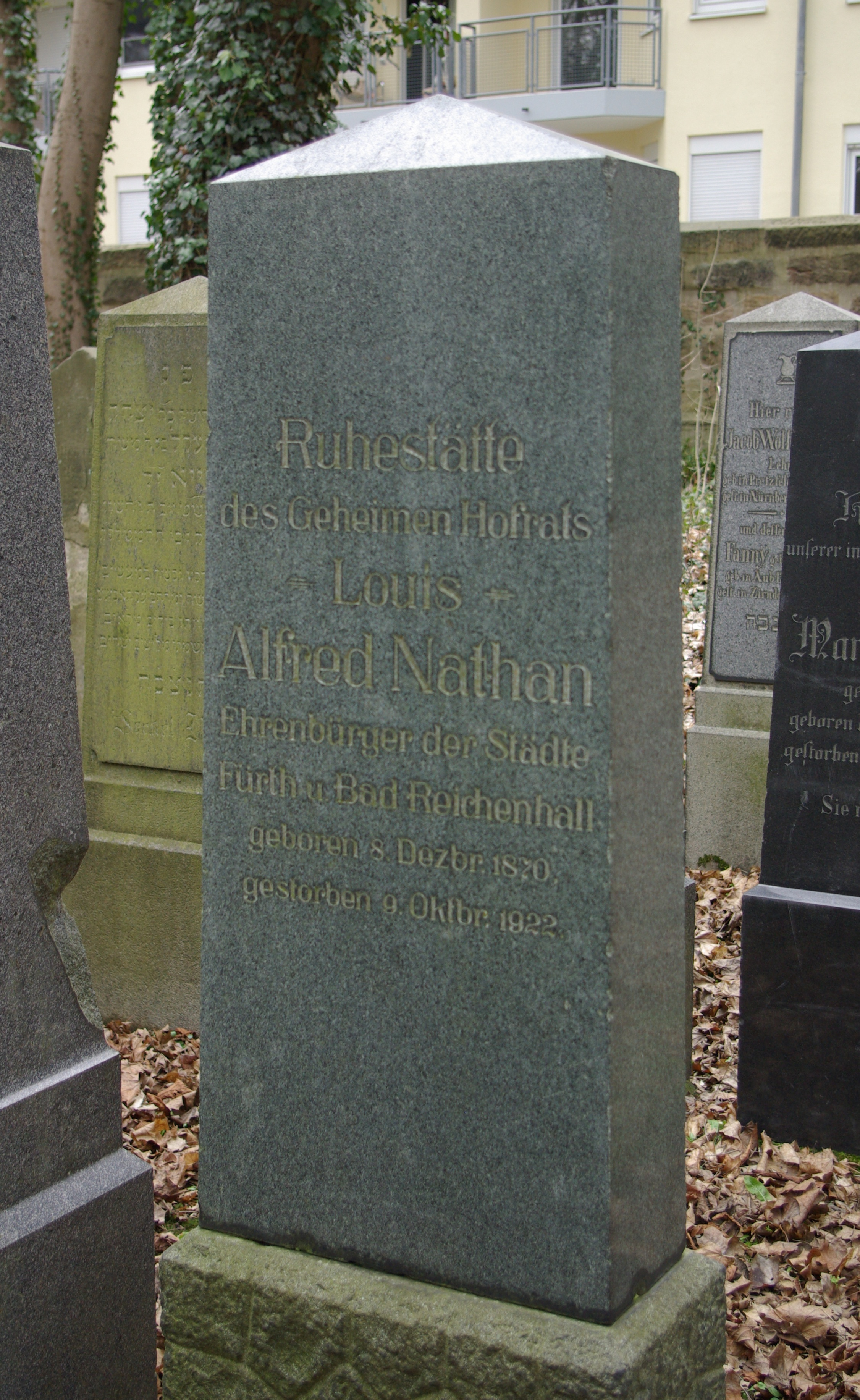 Alter Jüdischer Friedhof in Fürth. Grab von Alfred Nathan.